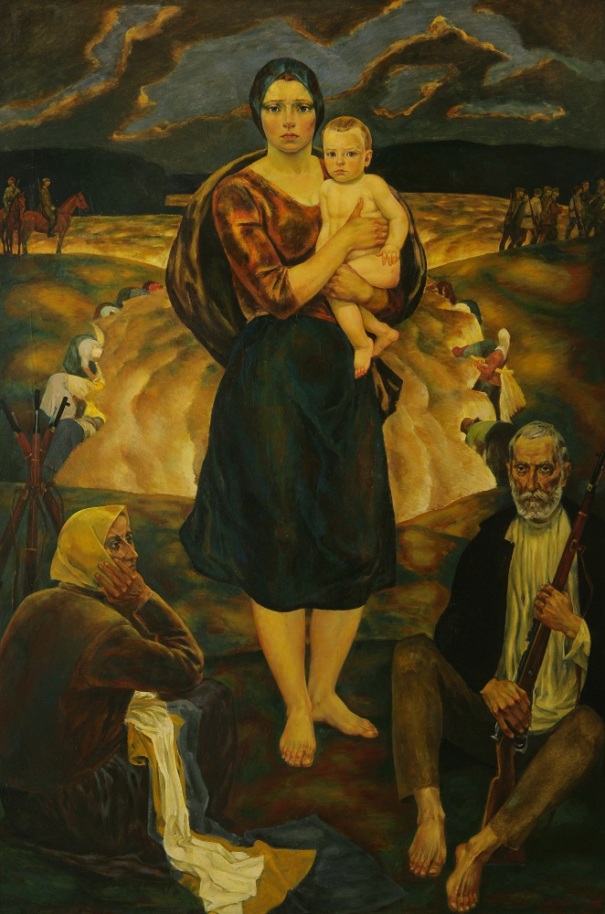 Холст, масло. Национальный художественный музей РБ